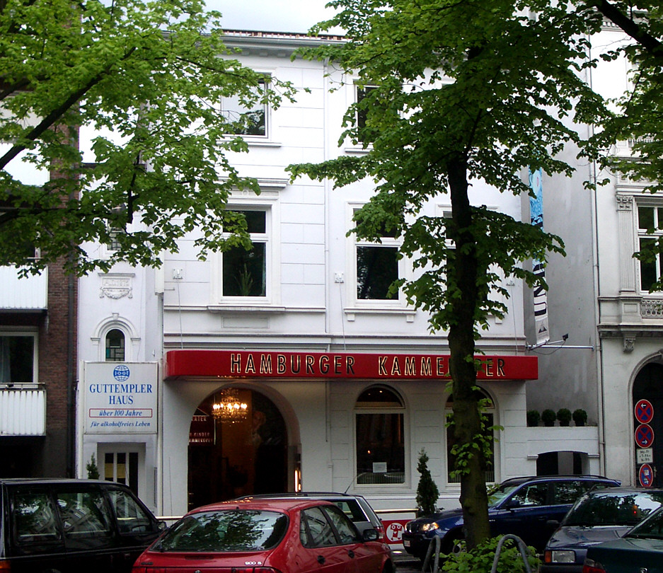 Hamburg, Germany: Alleetheater (Hamburger Kammeroper) / Theater für Kinder, Max-Brauer-Allee, Altona